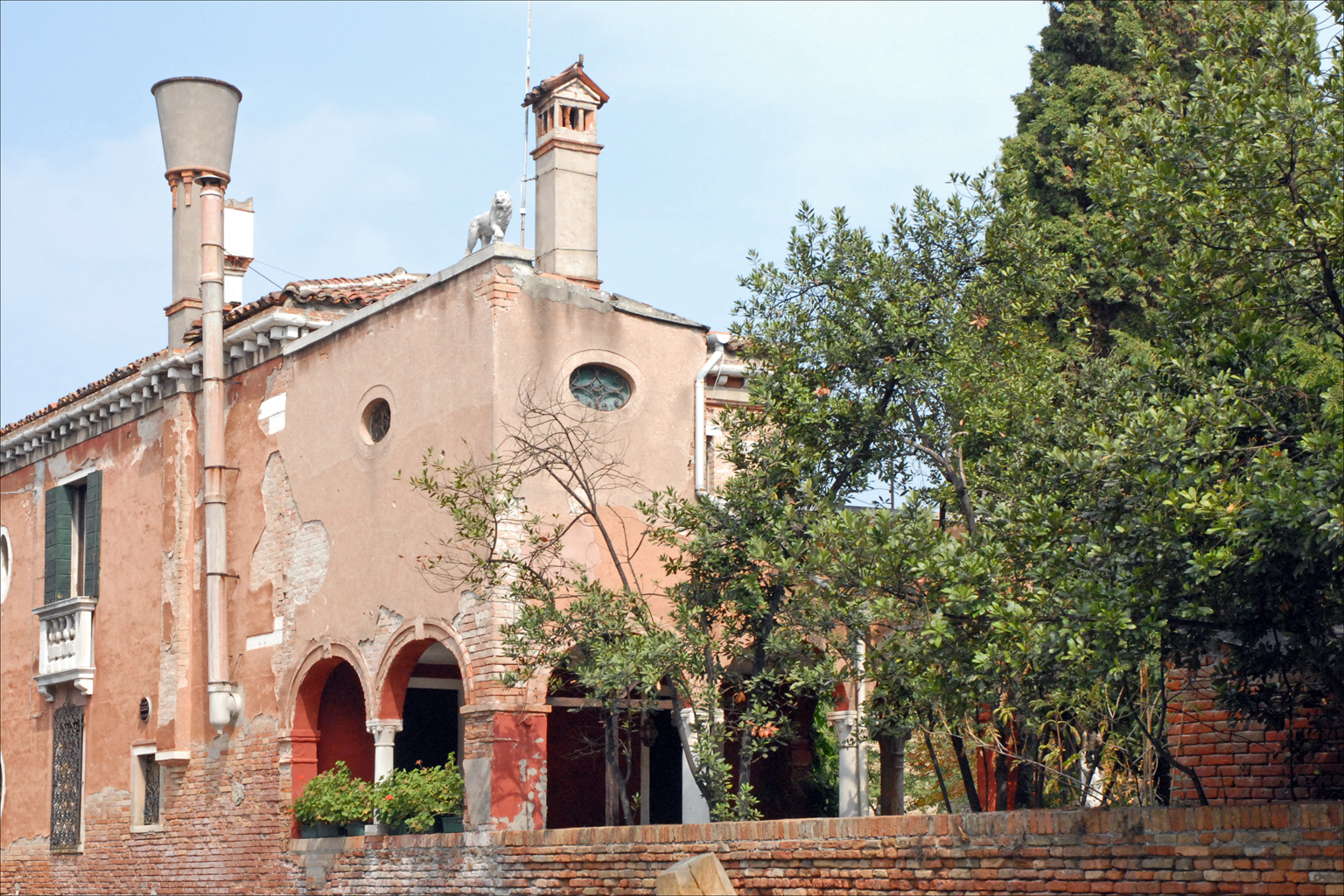 La maison du "Giardino Eden" (le jardin d'Eden) Cette propriété est composée d'une maison principale (photo) et de deux maisons secondaires situées sur un vaste terrain donnant au sud sur la lagune de Venise et dont l'entrée se trouve Rio della Croce. Elle est située sur l'île de la Giudecca, près de l'église du Rédempteur et de la prison aujourd'hui désaffectée dont elle est mitoyenne. Elle a été achetée par un couple d'aristocrates anglais : Sir Frederic Eden (1828-1916) et son épouse Caroline (1837-1928) en 1884 qui l'a mise en valeur en créant un jardin devenu célèbre et dont F. Eden a raconté l'histoire dans un ouvrage publié en 1903. En 1928, à la mort de son épouse Caroline, la propriété a changé plusieurs fois de propriétaire. Le dernier d'entre eux a été le peintre autrichien Hundertwasser qui l'a occupée à partir de 1979 jusqu'à sa mort en 2000. Aujourd'hui elle appartient à la fondation Hundertwasser mais il n'est pas possible de la visiter. Le jardin est cité dans l'ouvrage "Venise, insolite et secrète", de Thomas Jonglez et Paola Zoffoli Editions Jonglez, juin 2011 pages 364 et 365, Références du livre sur le jardin : "Un jardin à Venise" Titre original : "A garden in Venice" de Frédéric Eden publié pour la première fois en 1903 par la revue "Country Life et Georges Newnes Publié en fac similé par Frances Lincoln adresse Traduit de l'anglais et présenté par Marie-Thérèse Weal Edité en France par les éditions Actes Sud, Arles, 2005 Edité en Italie par les éditions Pendragon, Bologne (Un giardino a Venezia)